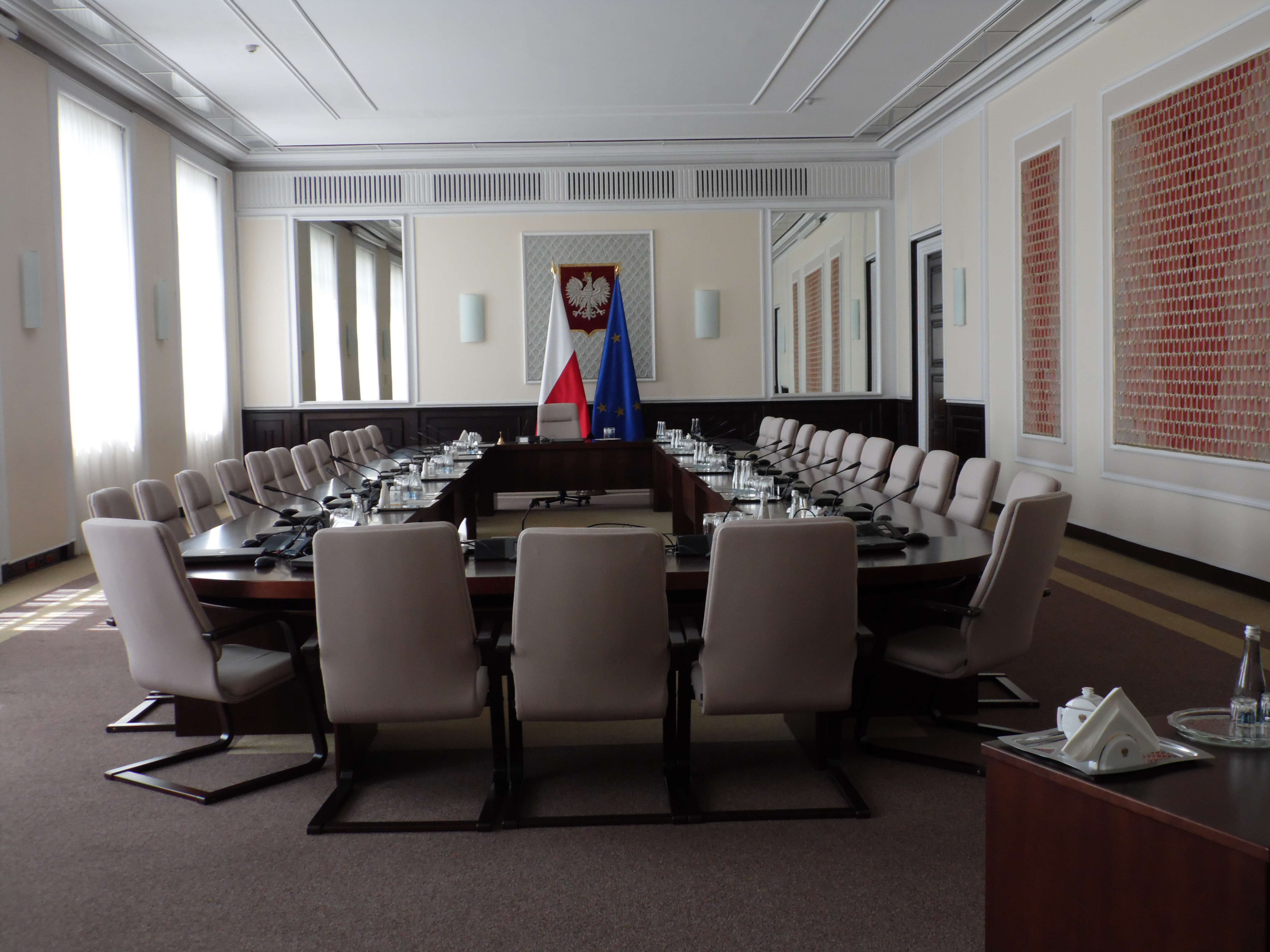 Sala im.Andrzeja Frycza Modrzejewskiego, W tej sali odbywają się posiedzenia Rady Ministrów